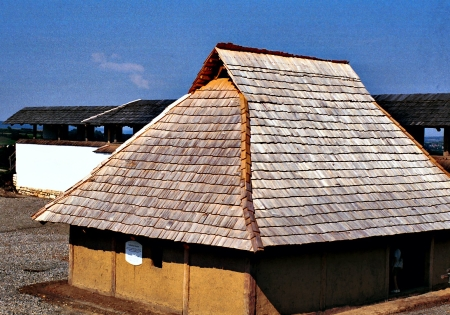 Das Herrenhaus der Heuneburg bei Hundersingen. Ein Beispiel aus der Keltenzeit.